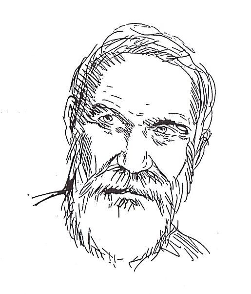 דיוקן עצמי של דני קרמן